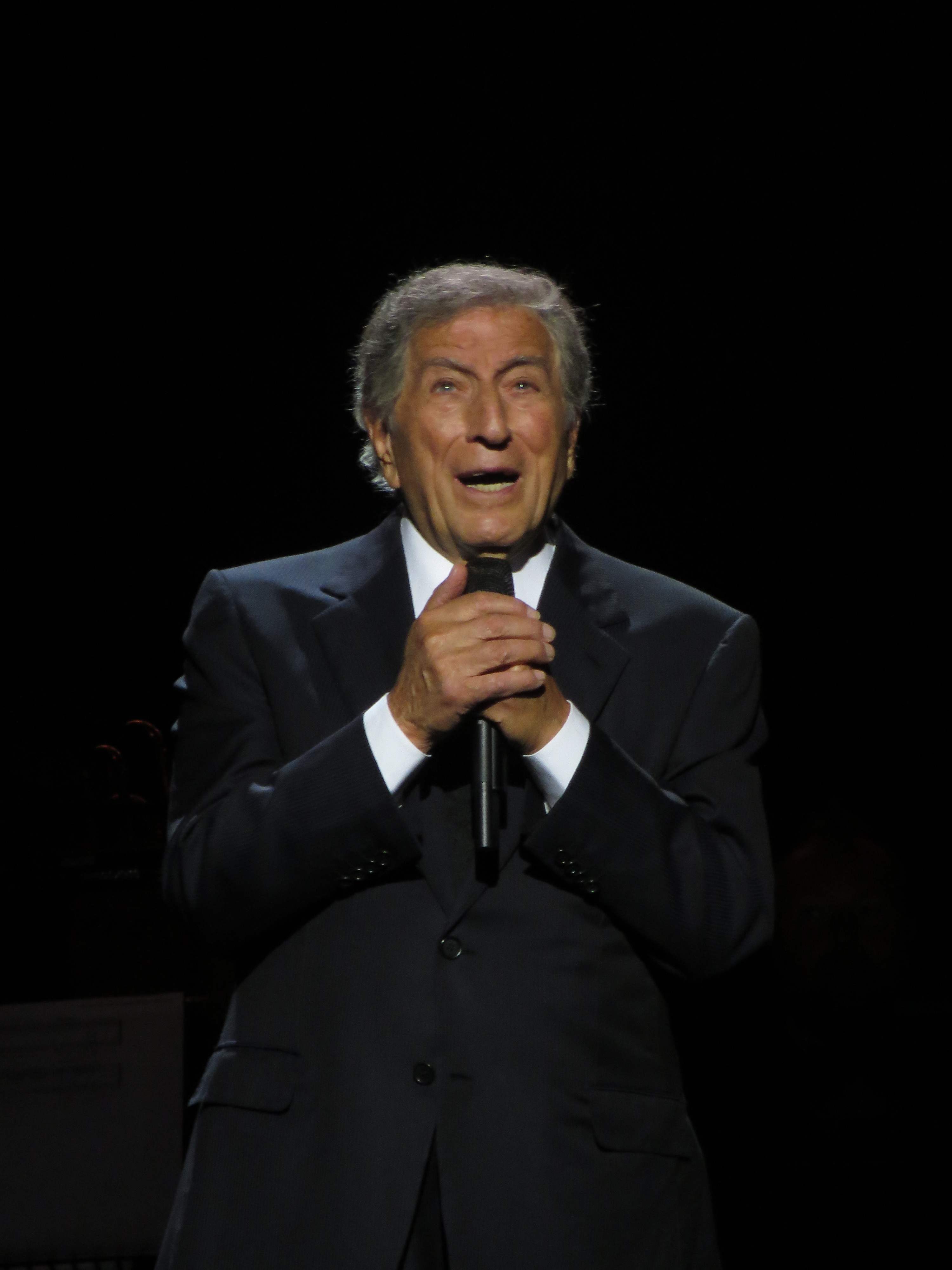 Tony Bennett & Lady GaGa 10